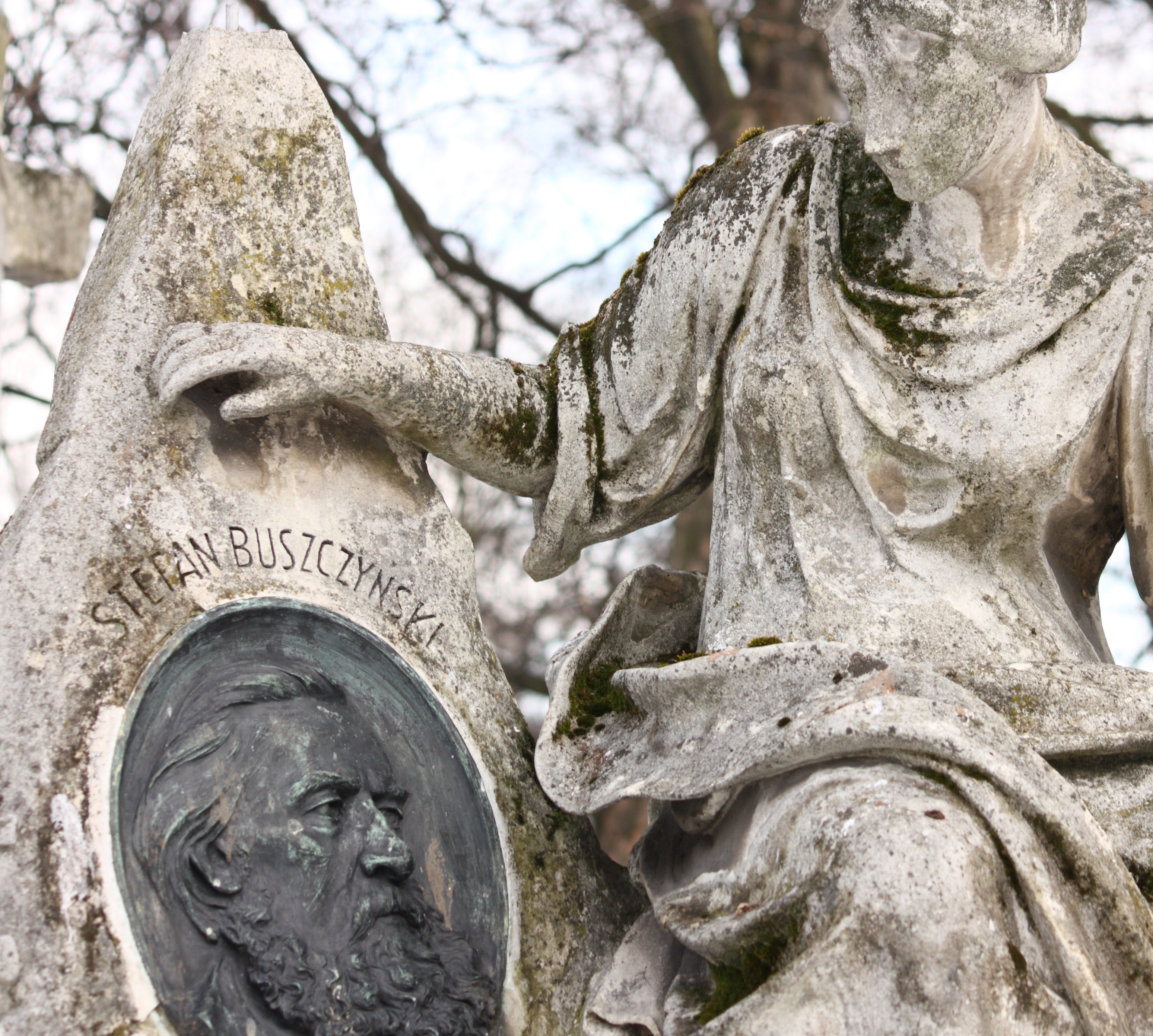 Grób Stefana Buszczyńskiego na Cmentarzu Rakowickiem w Krakowie